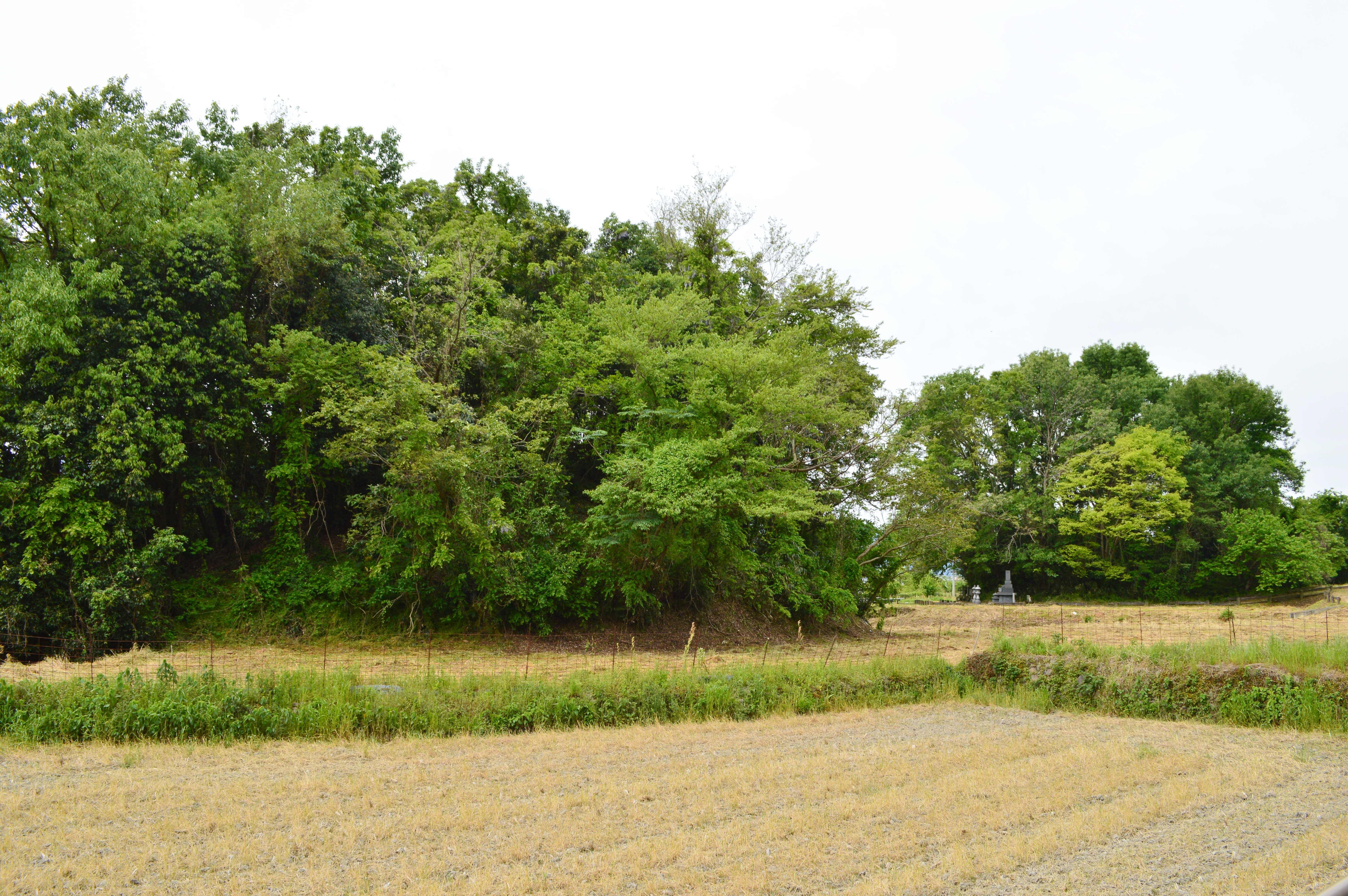 段の塚穴古墳群 太鼓塚古墳と棚塚古墳 Nikon D3200